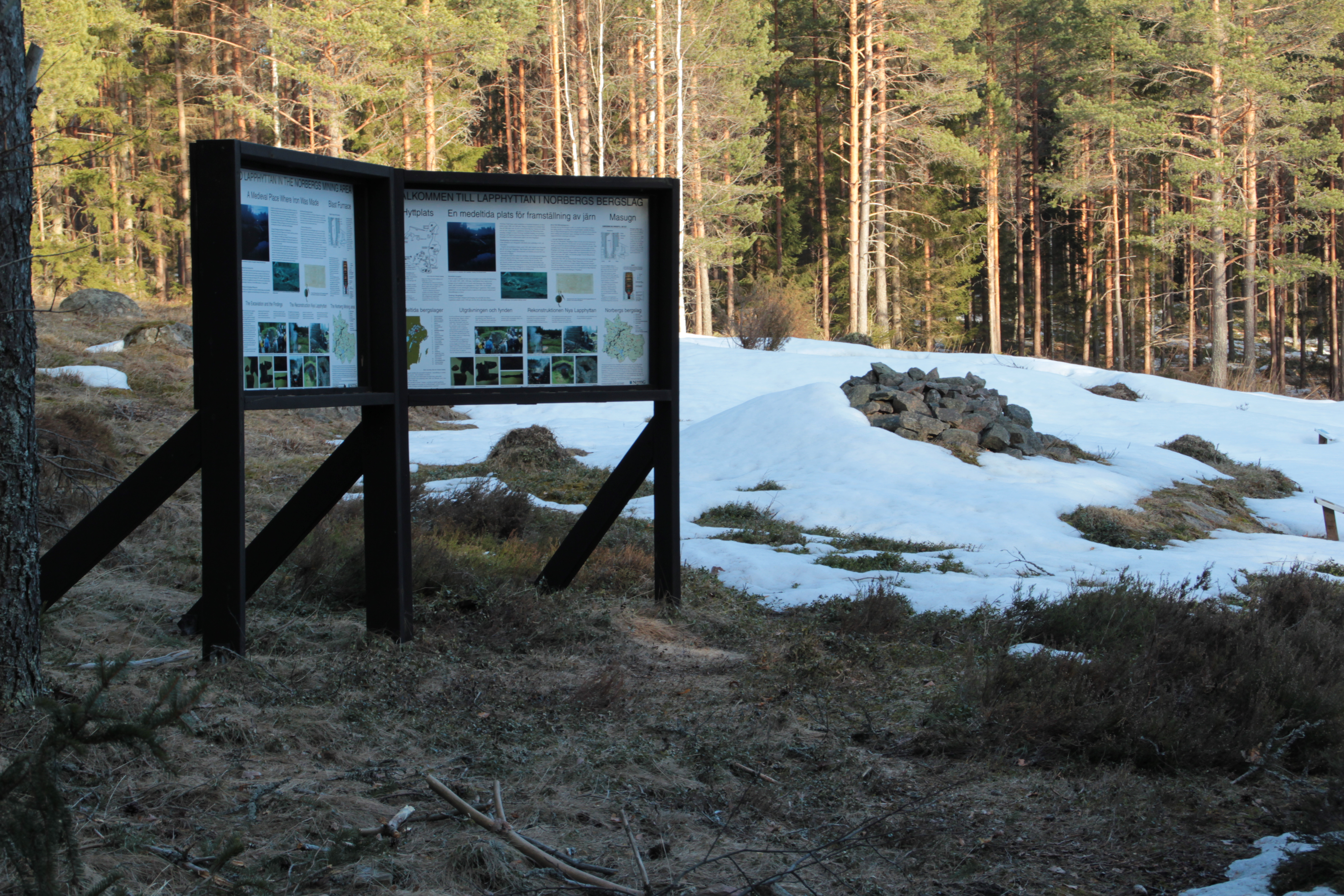 Informationsskylt på Lapphyttan, Norbergs kommun, Sverige. I bakgrunden en husgrund med spismursröse.